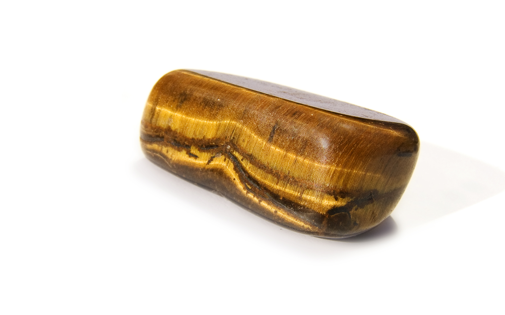 Tigers eye quartz